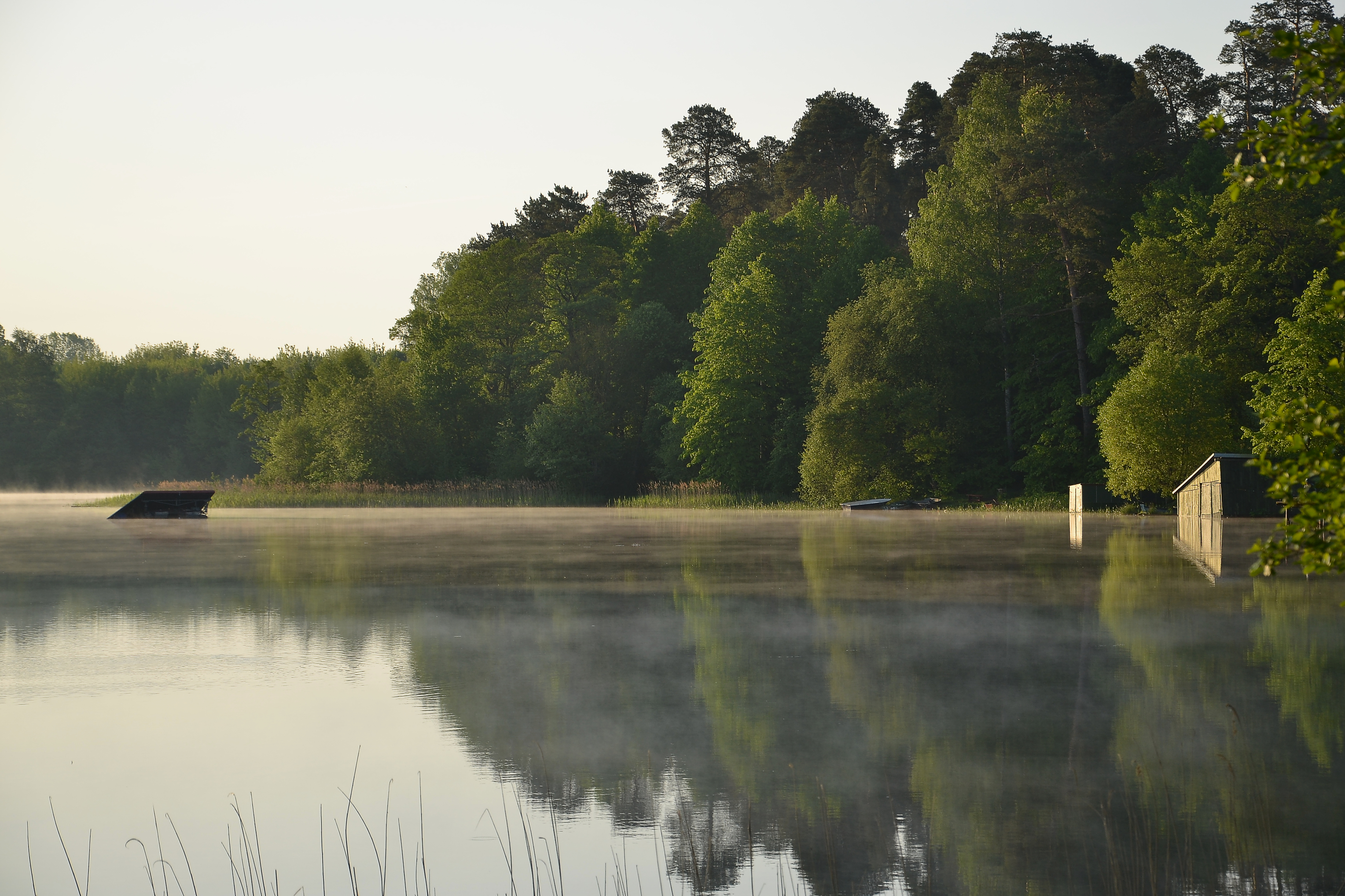 Augustów - Jezioro Białe. Obszar specjalnej ochrony ptaków Puszcza Augustowska. This is a photography of Natura 2000 protected area with ID PLB200002